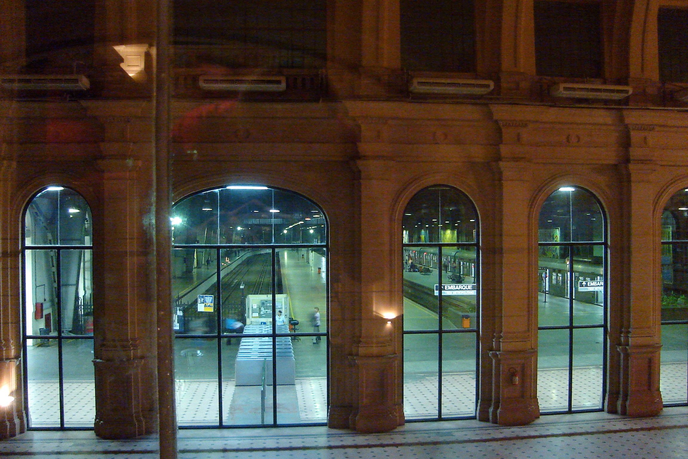 Estação Julio Prestes da CPTM, vista da Sala São PauloEstação Julio Prestes